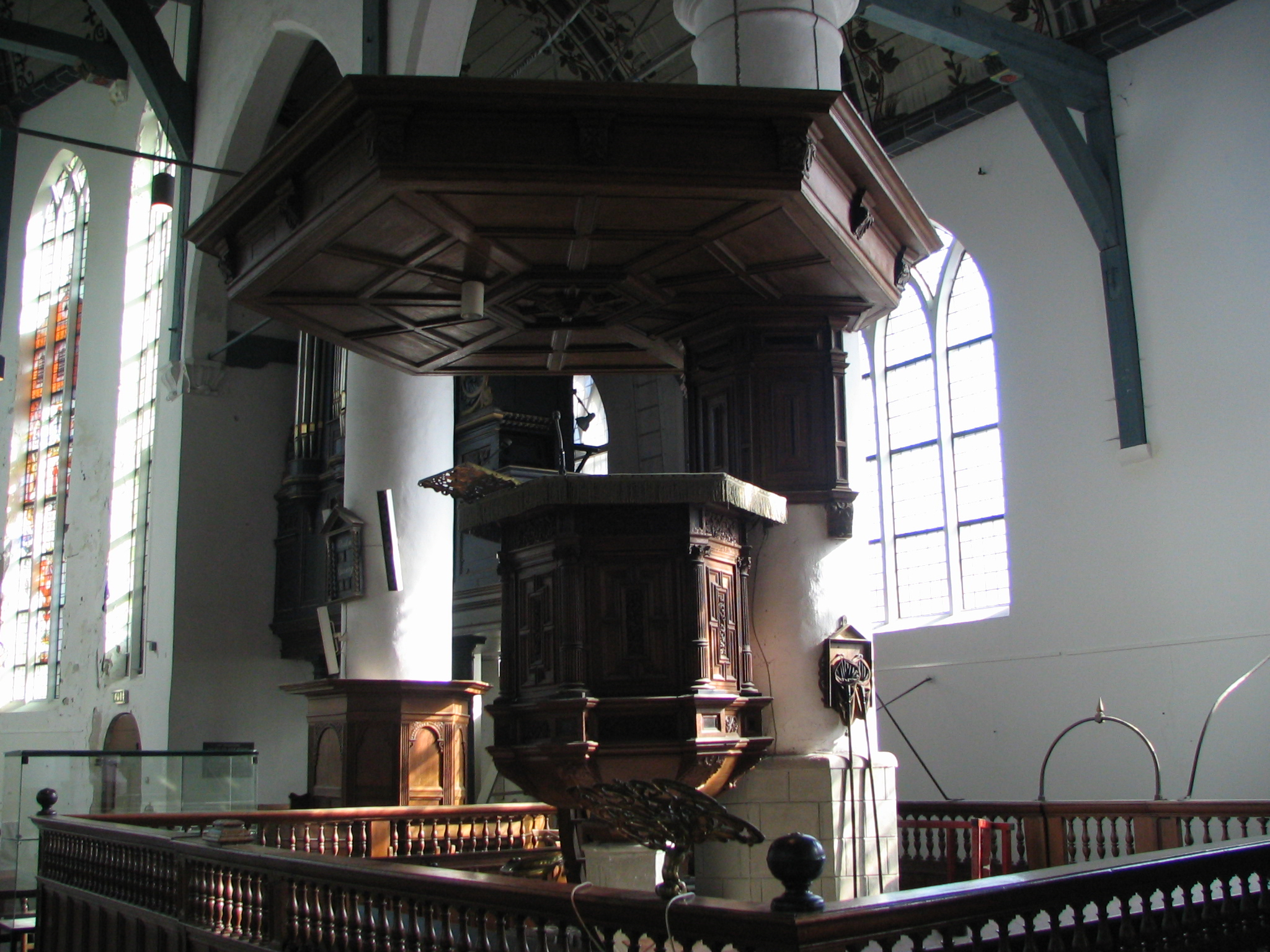 eigen foto. GerardM 20 sep 2004 20:05 (CEST)